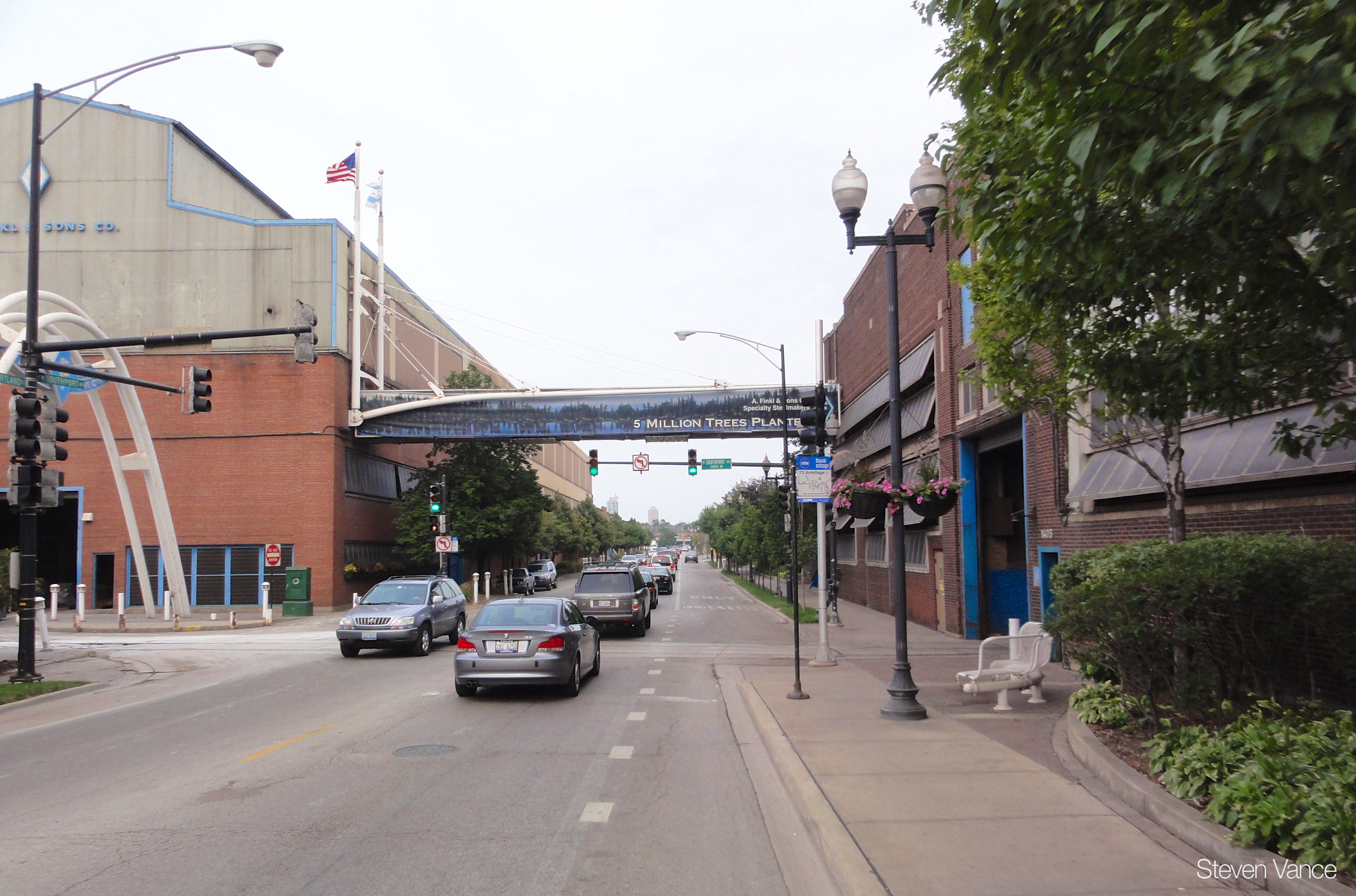 Biking past A. Finkl & Sons Steel